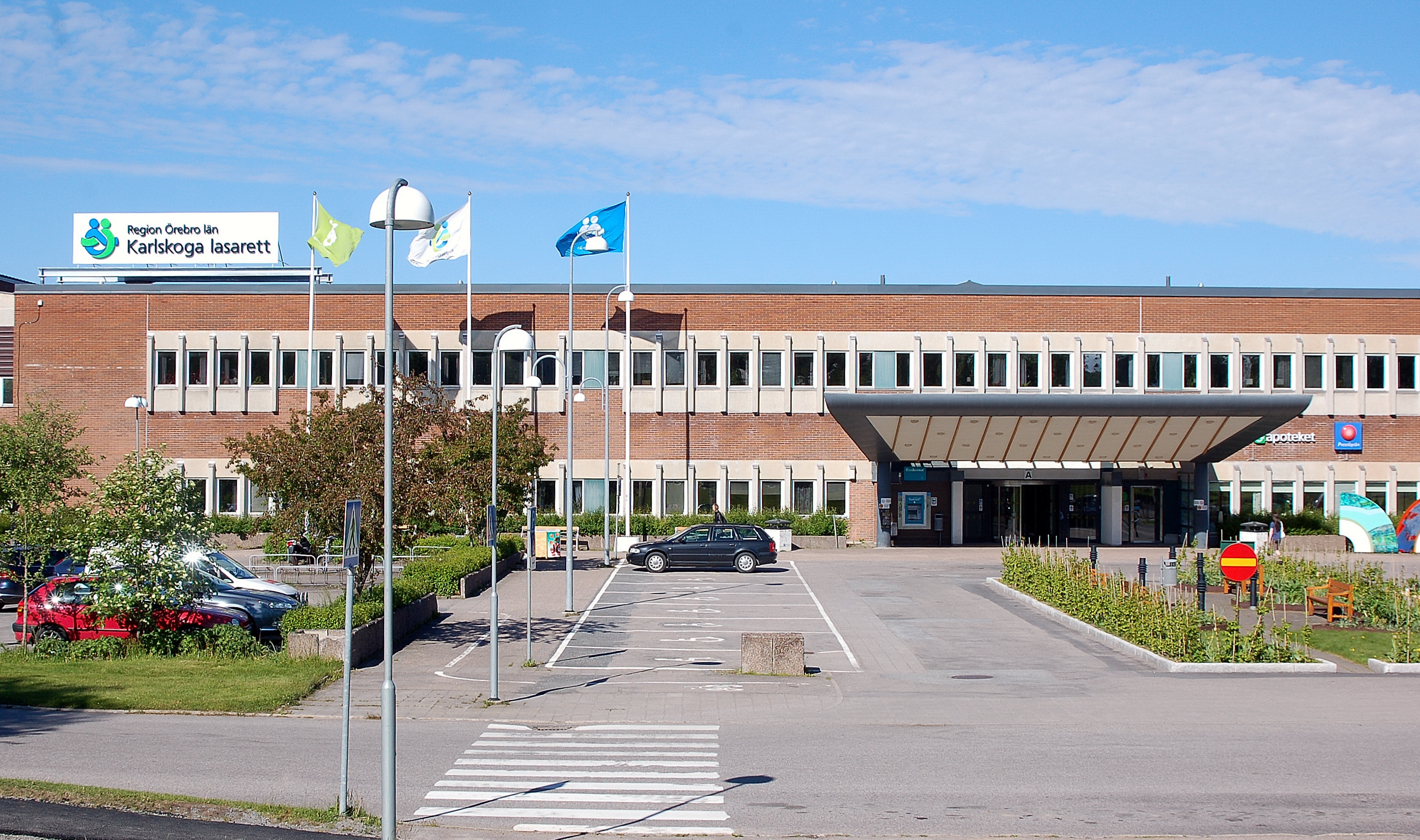 Karlskoga Lasarett huvudentré.